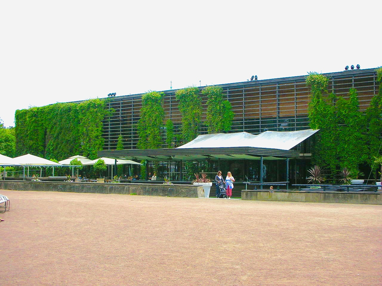 Restaurang Trägårn i Göteborg. Editerad bild för att föra fram de rätta färgerna i förhållande till den troligen avsiktligt fördunklade bilden i originalet.